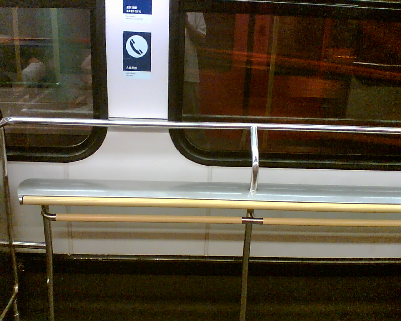 香港輕鐵車廂內的半腰座椅.